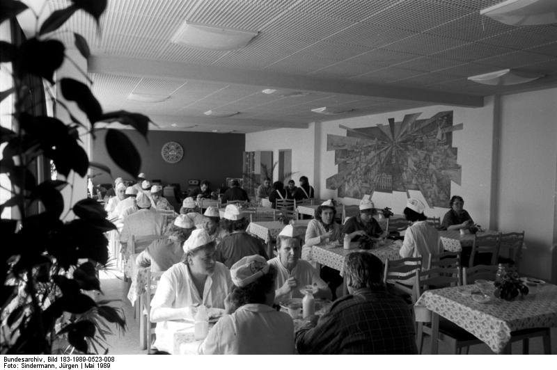 Rostock-Warnemünde, Klub- und Speiseraum der FPG ADN-ZB/Sindermann 23.5.89 Bez. Rostock: Neuer Fischverarbeitungsbetrieb Ein modern ausgestatteter Klub- und Speiseraum steht den Beschäftigten des neuen Fischverarbeitungsbetriebes der Fischereiproduktionsgenossenschaft Warnemünde zur Verfügung.